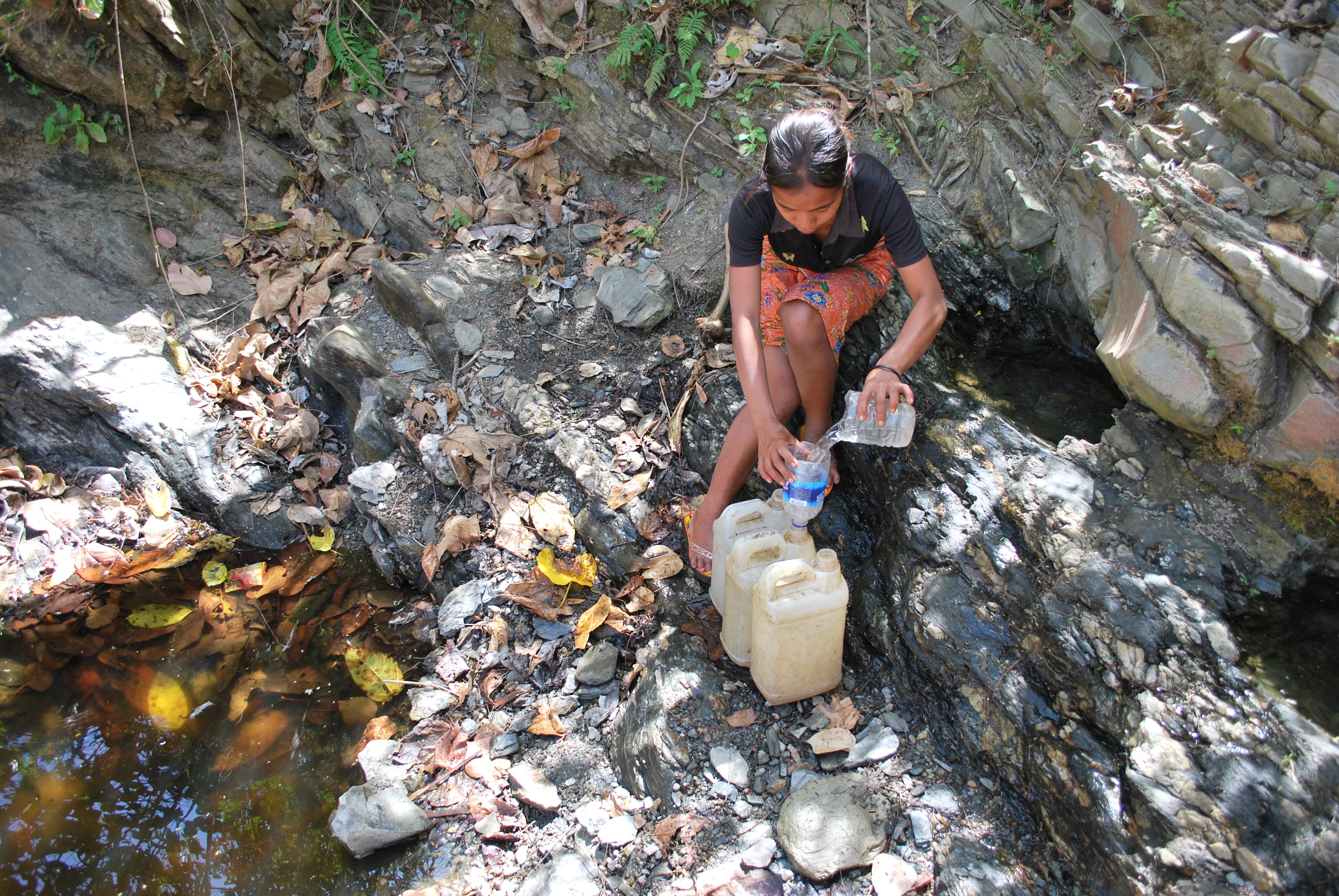 Trinkwasser holen in Ili-Mano